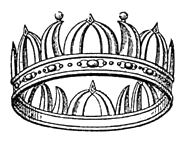 Corona navalis (Schiffskrone)